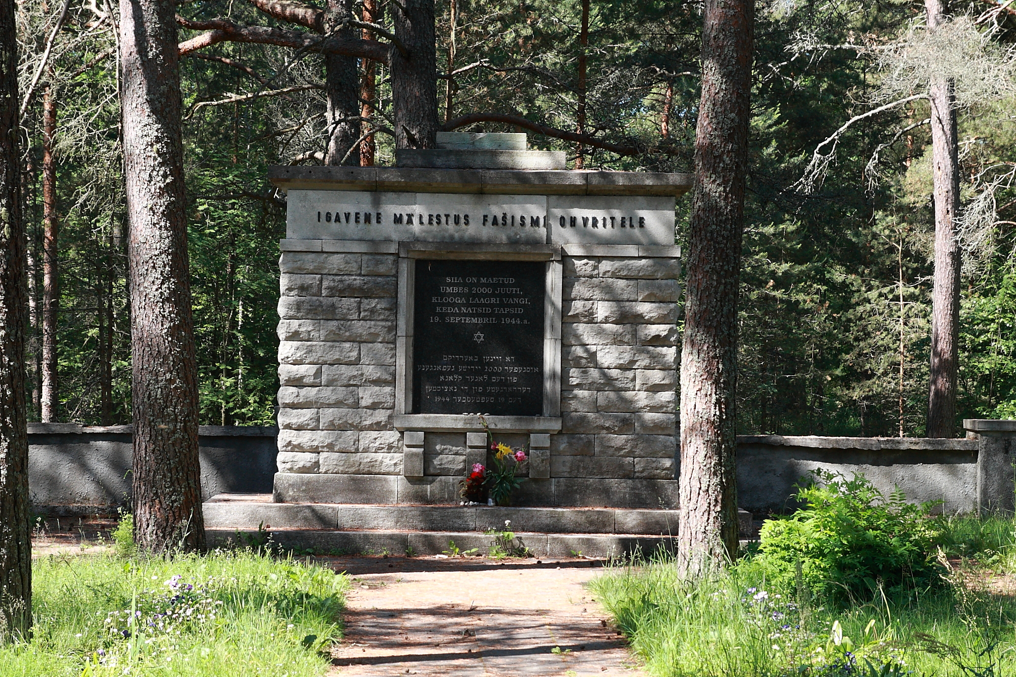 Klooga terroriohvrite ühishaud